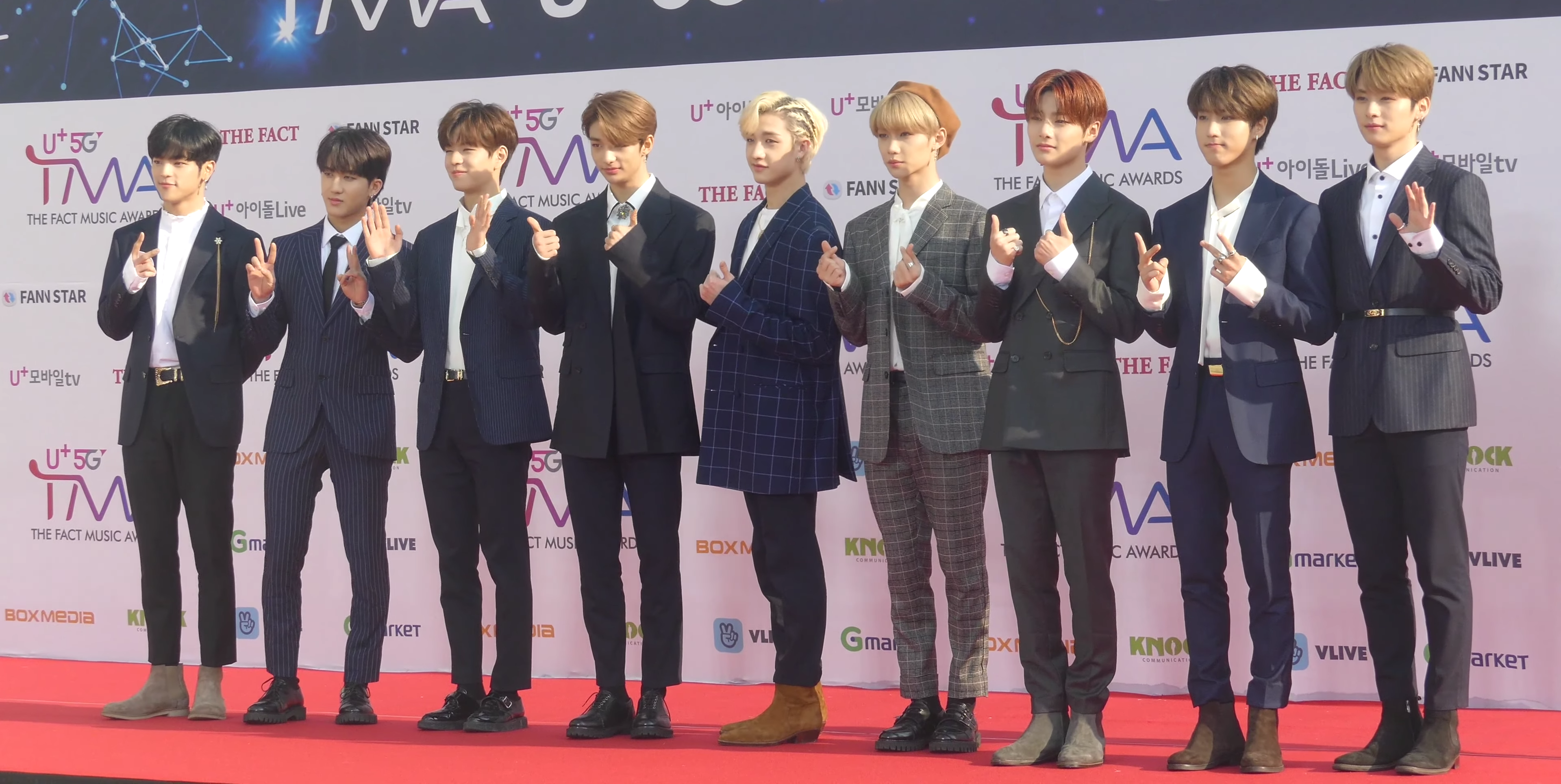 Stray Kids於2019年4月24日在The Fact Music Awards頒獎典禮